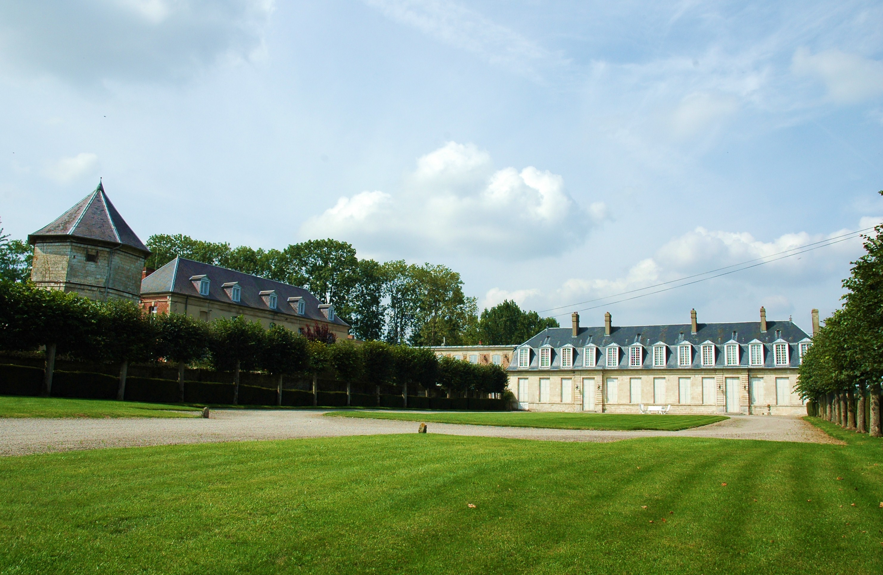 Marieux, Somme, fr, château.